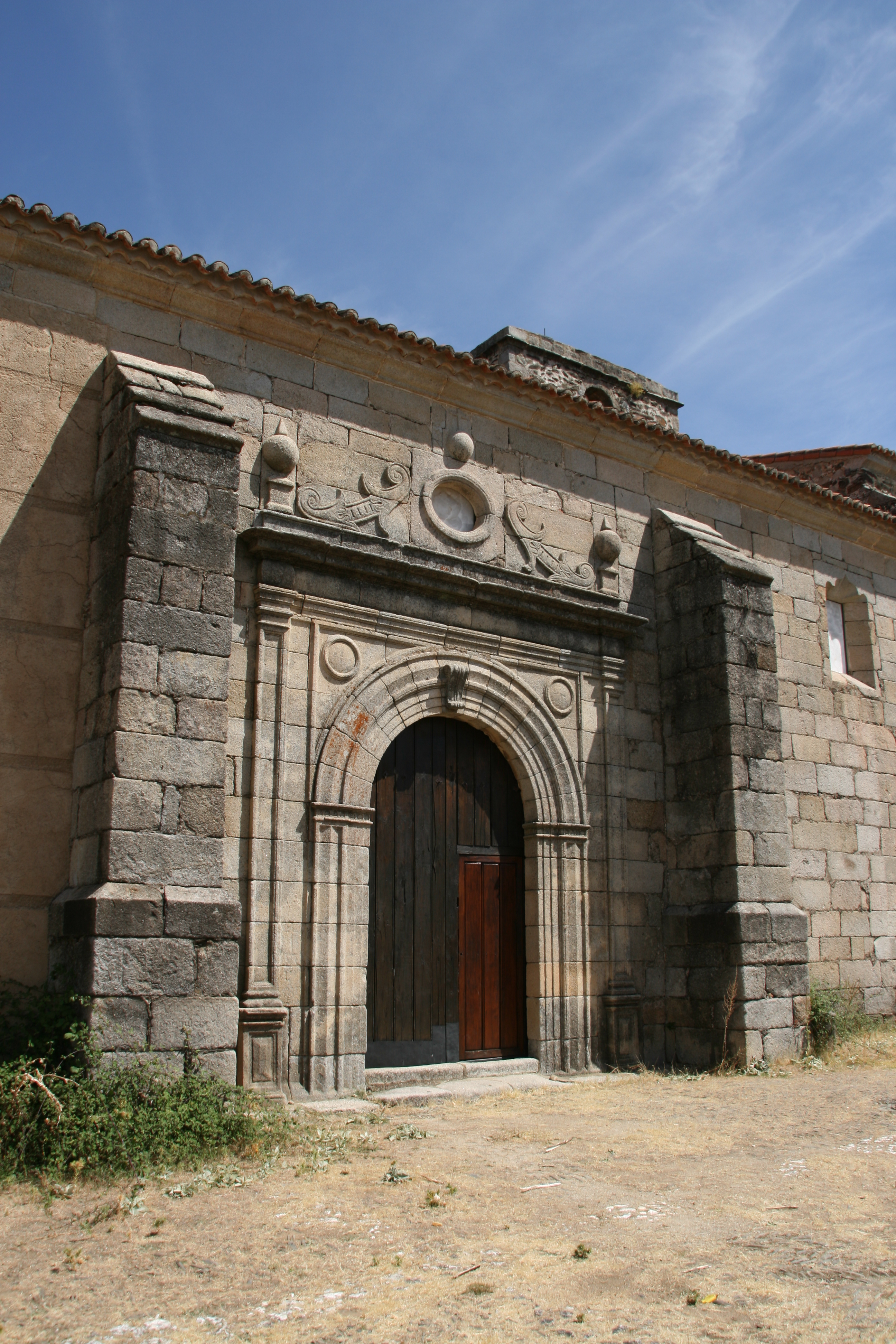 Puerta de la iglesia parroquial de la Asunción, en Granadilla